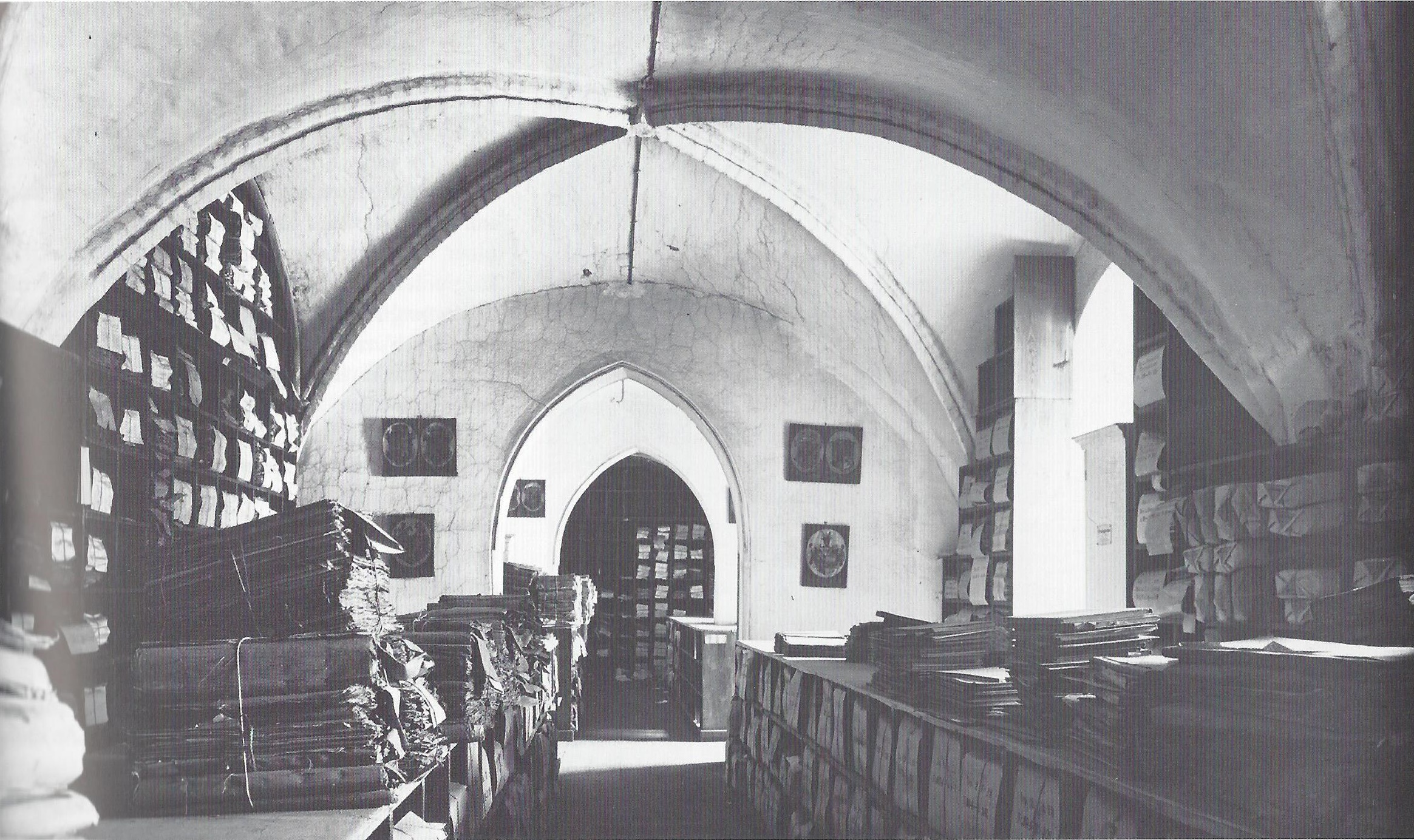 Nordseitige Gewölbe des Geheimen Archiv im Königsberger Schloss.